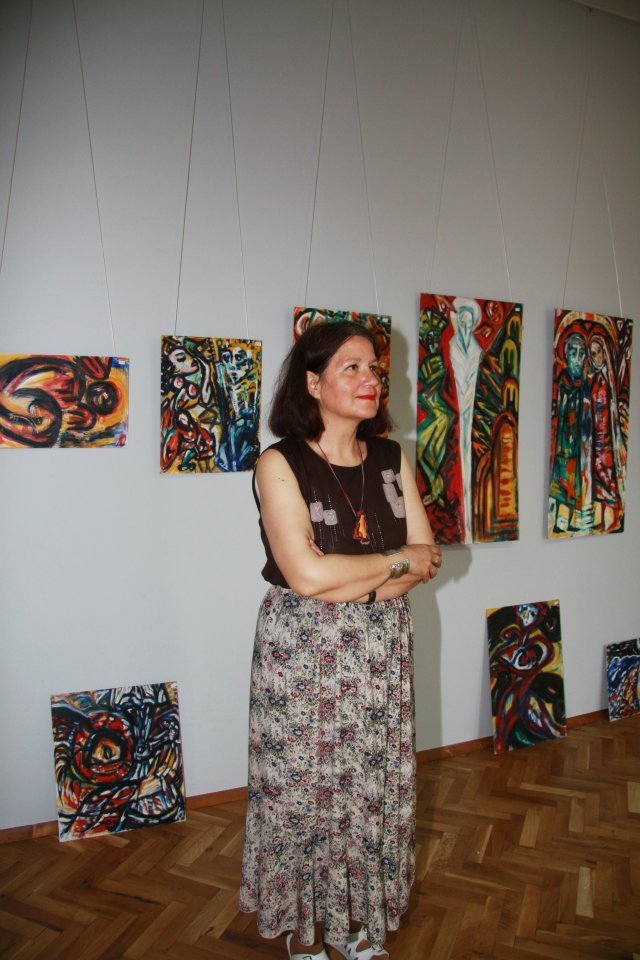 Kristin Jurukowa, Bulgarische Schriftstellerin und Malerin, vor ihren Bildern